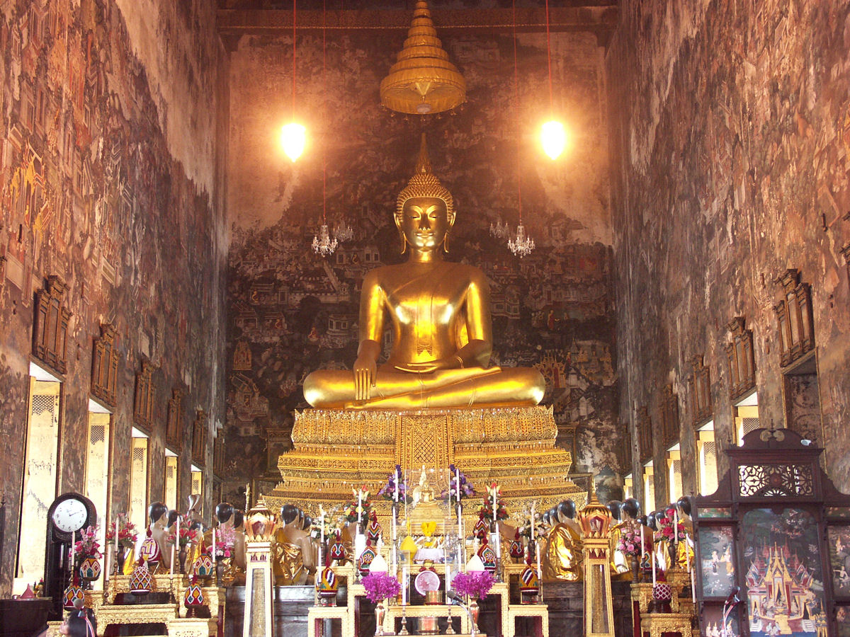 Wat Suthat, Bangkok, Thailand - พระพุทธตรีโลกเชษฐ์